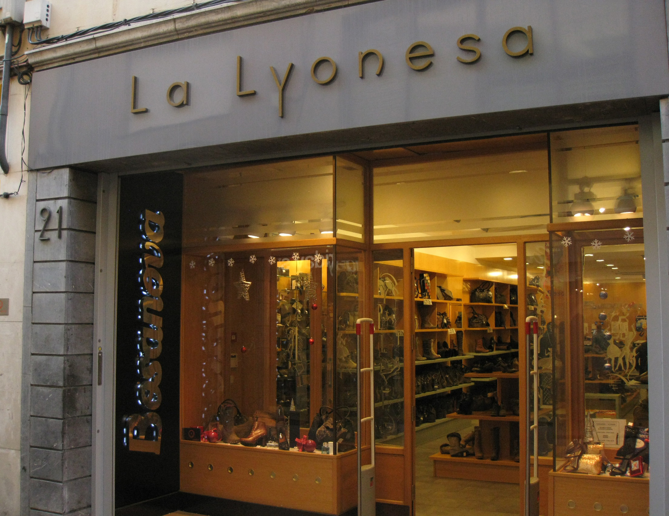 Antiga pastisseria La Lyonesa, al carrer de Sant Pere núm. 21 (Terrassa). Edifici racionalista d'Ignasi Escudé (1936). Actualment allotja una botiga d'objectes de pell.